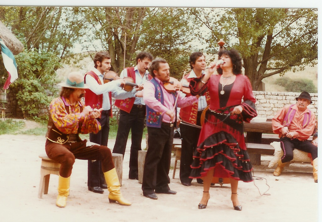 Pusztadänzer